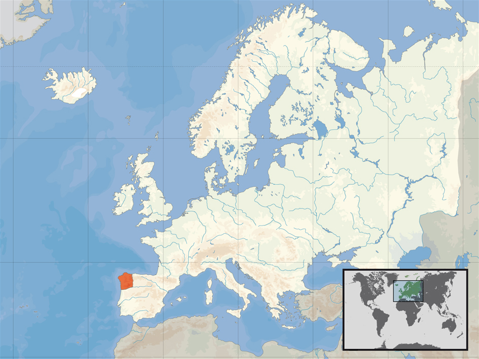 Mapa do reino de Galiza no século X d.C.